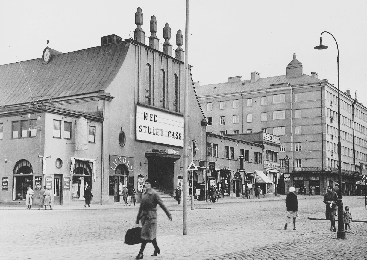 Biografen Stora teatern, Götgatan 49 / Tjärhovsgatan 2. Byggnadsår 1915. Arkitekter: Knut Nordenskiöld & Nils Cronholm